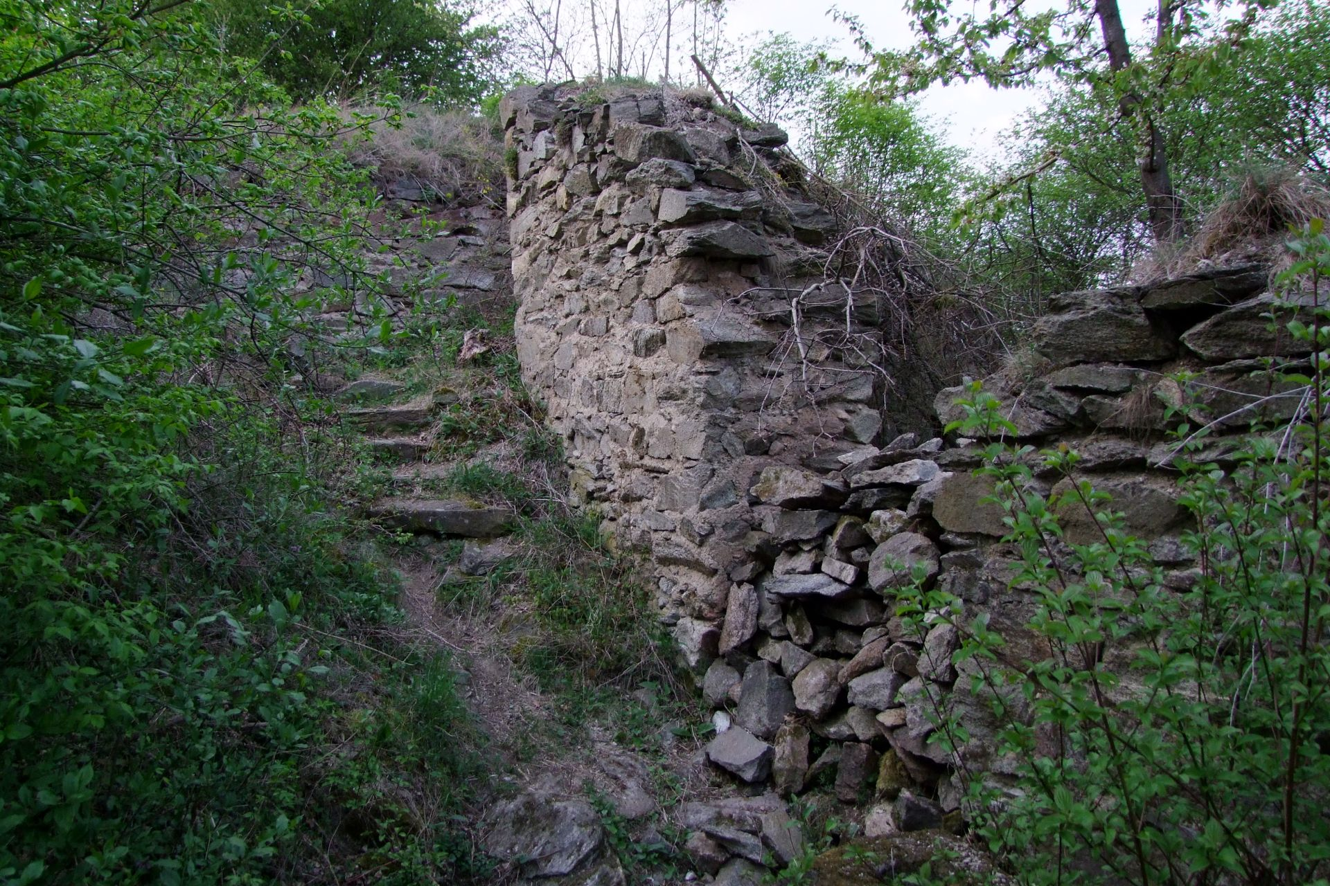 Burgruine Neudegg